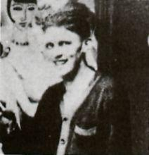 Piskač Bedřich (1898-1929)